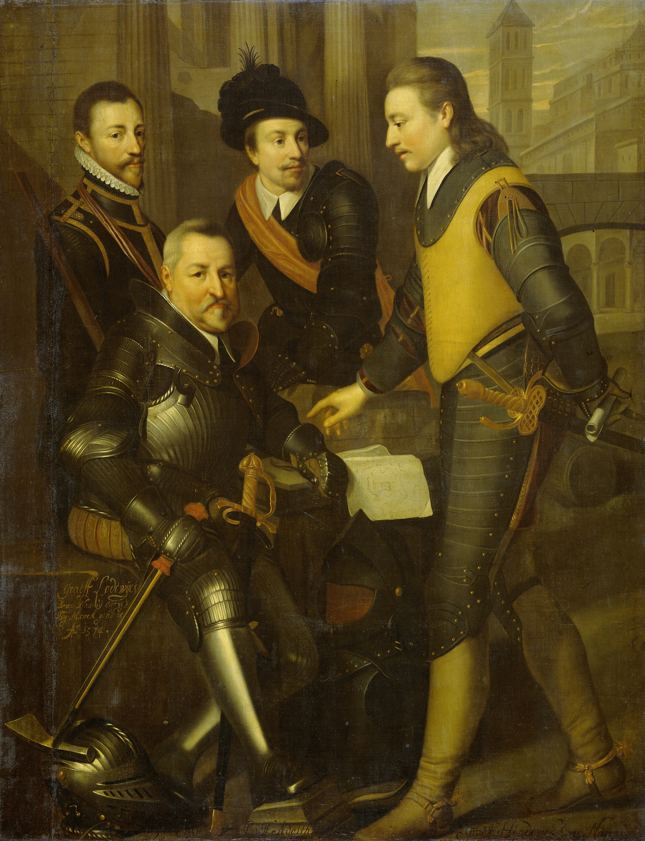 De vier graven van Nassau-Dillenburg, de broeders van Willem I, prins van Oranje: Jan de Oude (zittend) Hendrik, Adolf en Lodewijk. Afgebeeld tegen een achtergrond van architectuur. Op de tafel tussen hen in ligt een landkaart, op de grond helmen en stukken van een harnas. Jan heeft een strijdhamer in de hand.